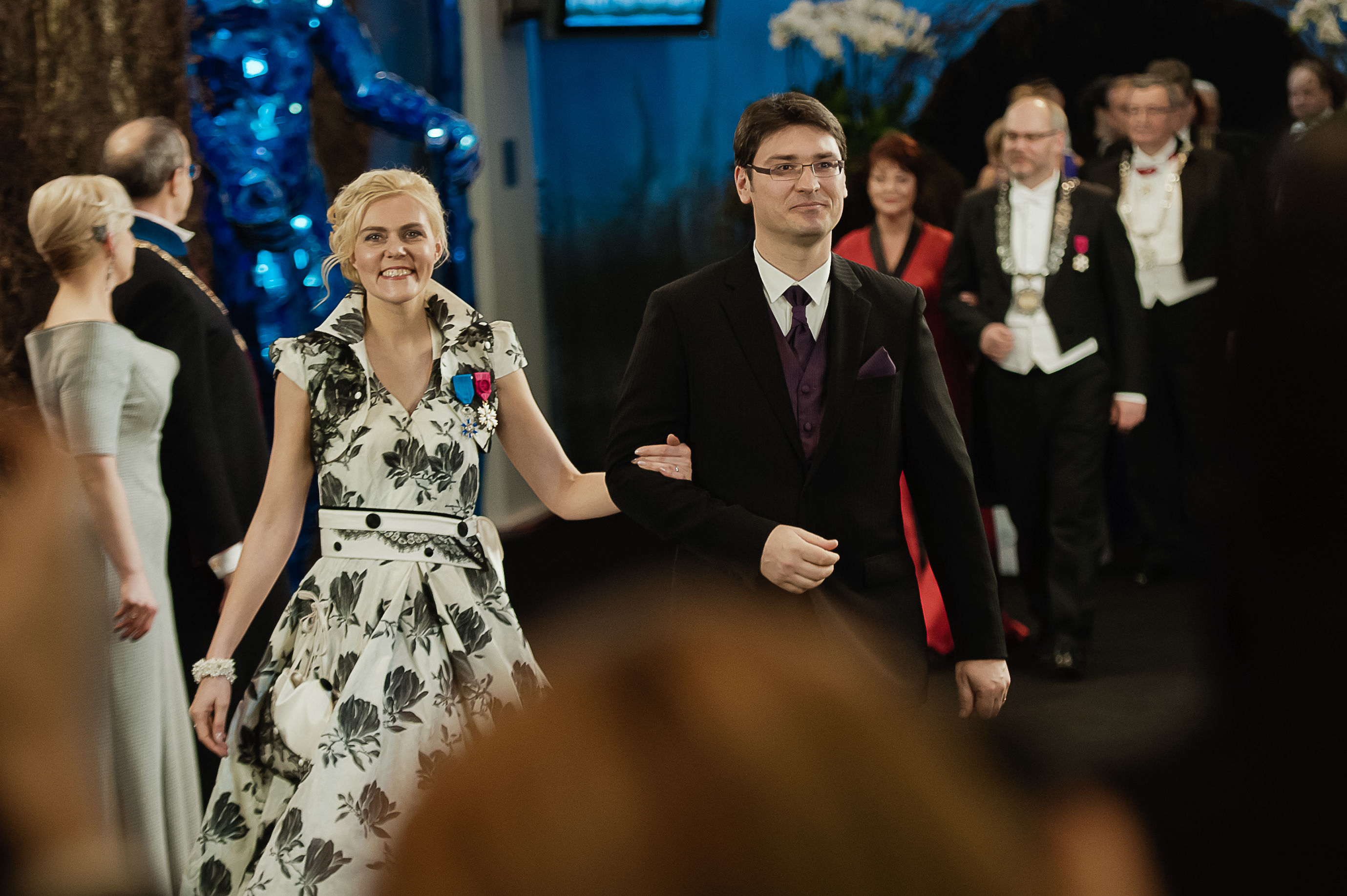 Euroopa Inimõiguste Kohtu kohtunik ja Rahvusvahelise Euroopa Õiguse Ühenduse president Julia Laffranque presidendi vastuvõtul.